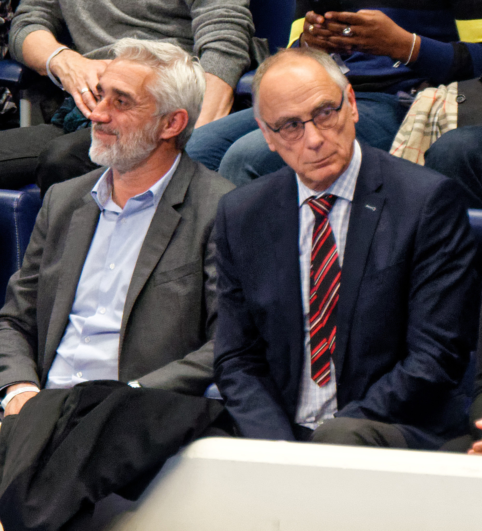 Rencontre de championnat entre le PSG et Pays d'Aix handball. A Coubertin, le 2 juin 2016.